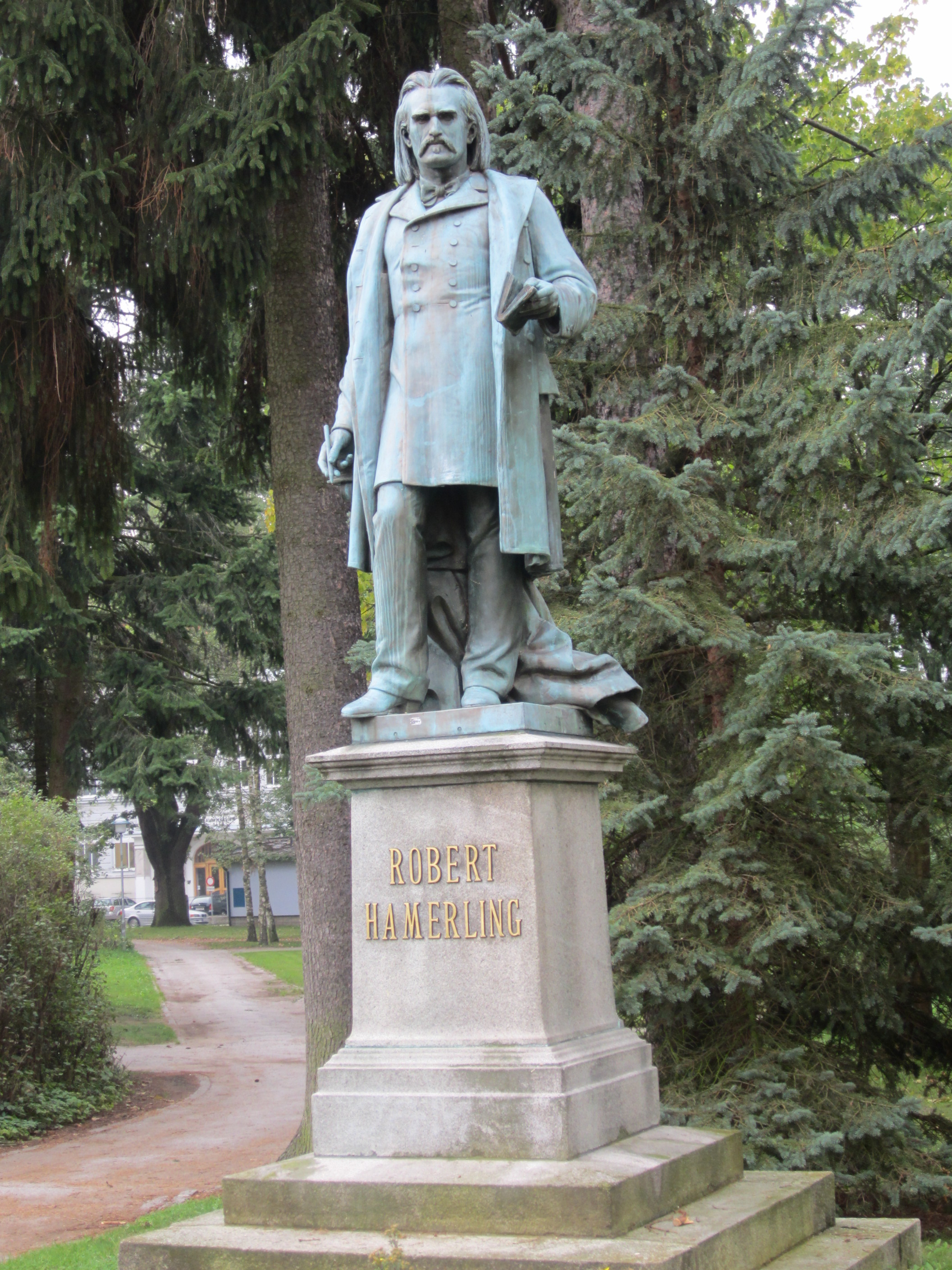 Eisengussdenkmal Robert Hamerling von 1893 im Stadtpark von Hans Brandstetter. Object location48° 48′ 48.13″ N, 15° 16′ 55.81″ E